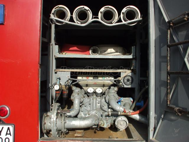 GAZ-66 TÜ-2 szivattyú